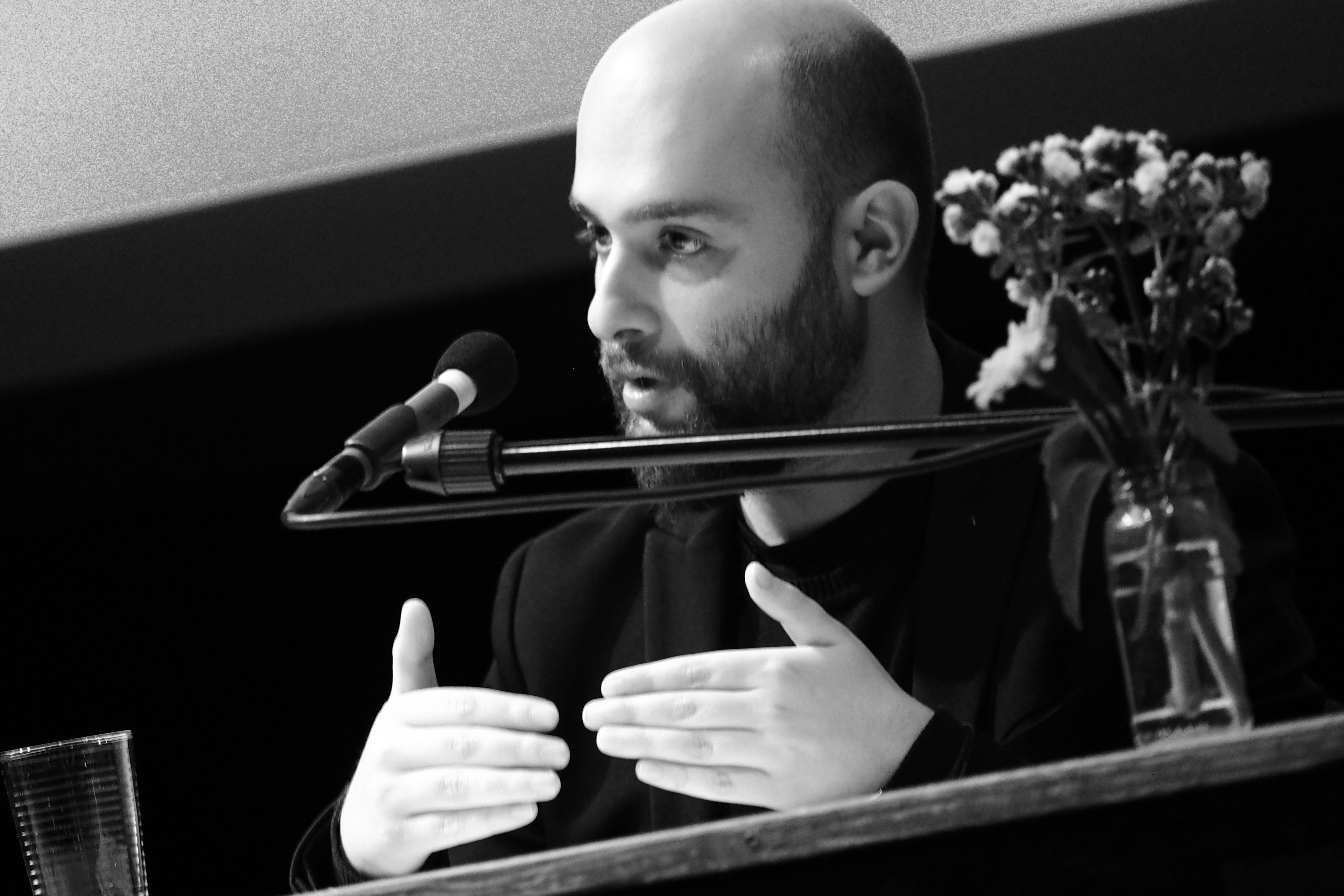 Lesung um Lyrikpreis München 2018